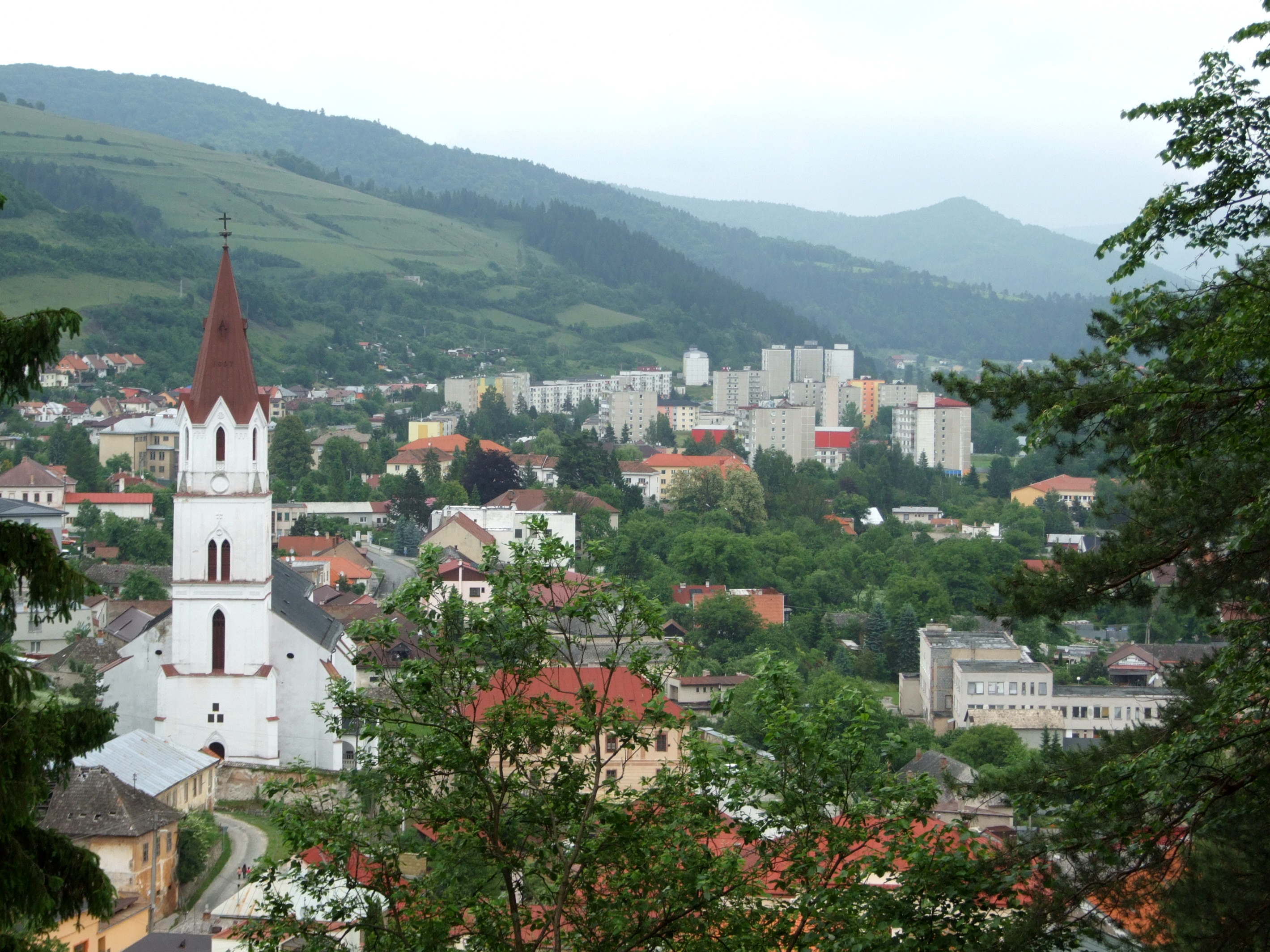 Kostol Nanebovzatia Panny Márie, 50 roky 14.st.